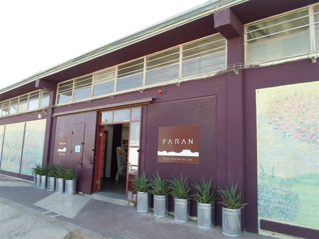 מפעל FARAN קוסמטיקה טבעית, מצפה רמון.